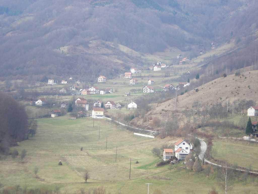 Село Оћуне код Мркоњић Града